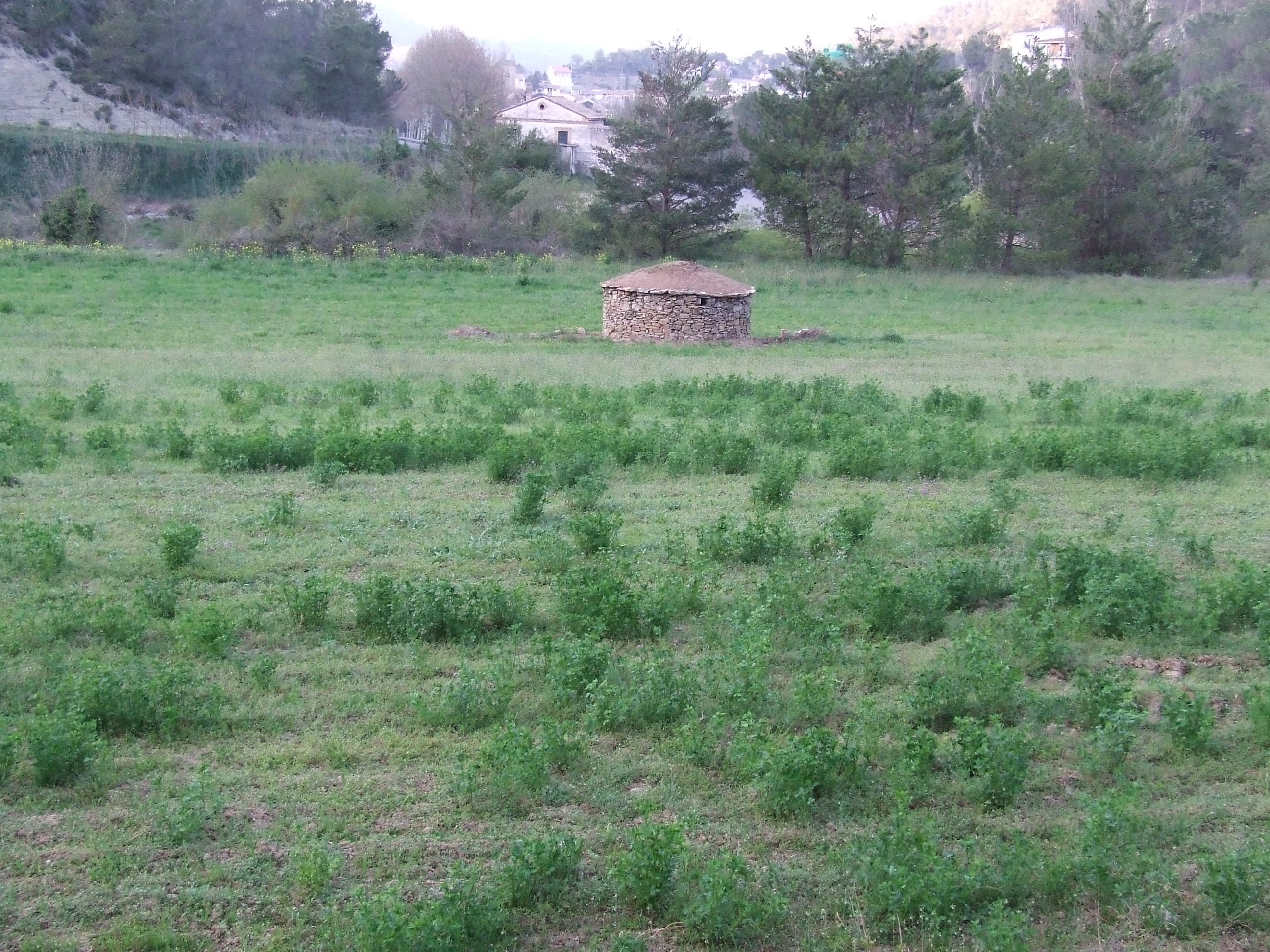 El Camp del Mestre Plans (Monistrol de Calders, Moianès)